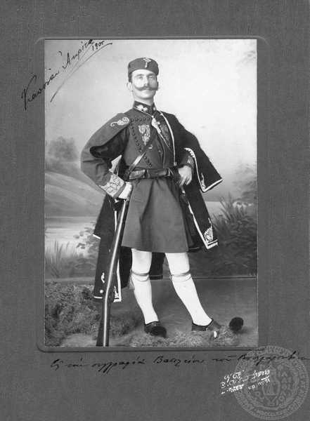 Константинос Мазаракис